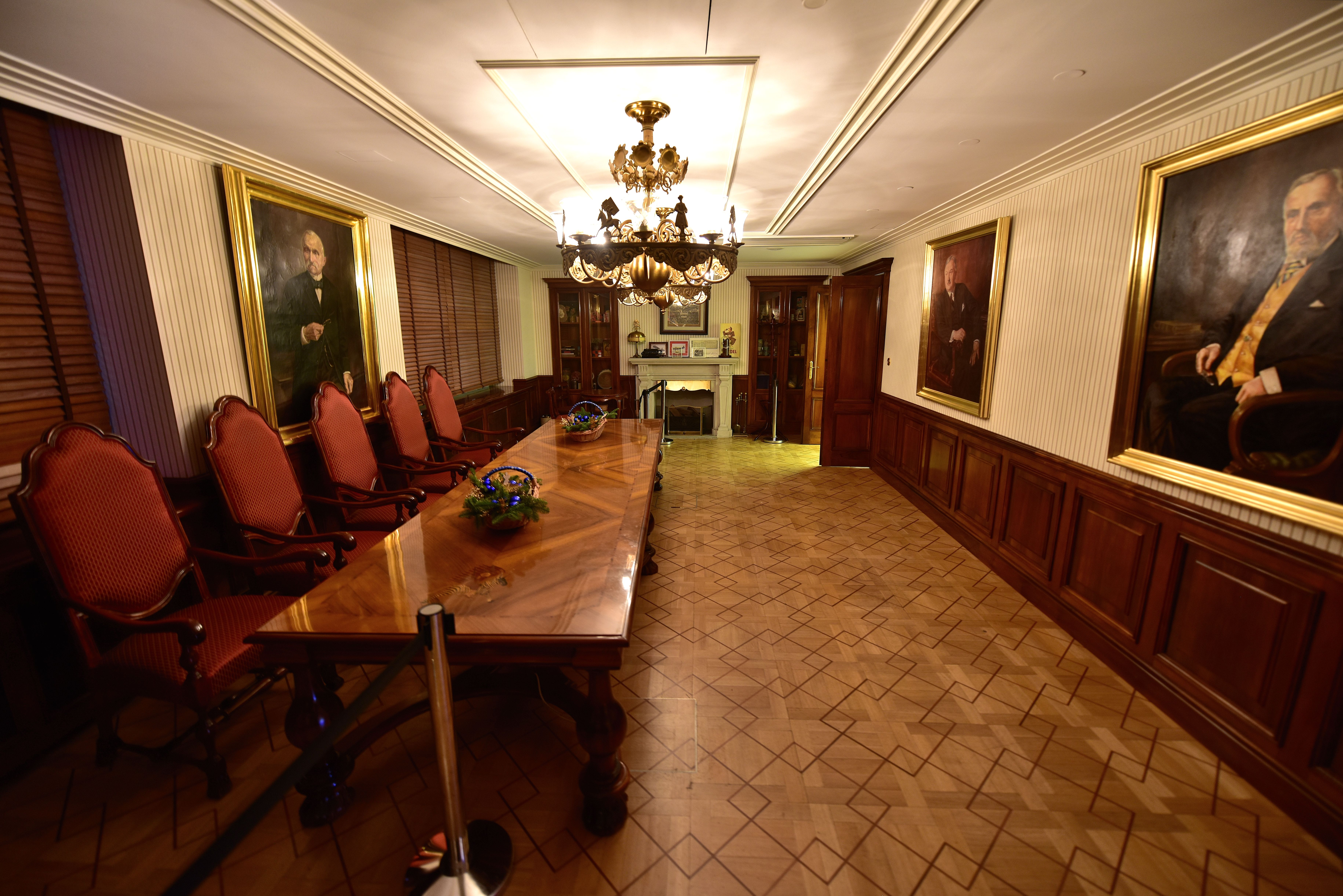 Fabryka Lotte Wedel w Warszawie. Historyczny gabinet Jana Wedla